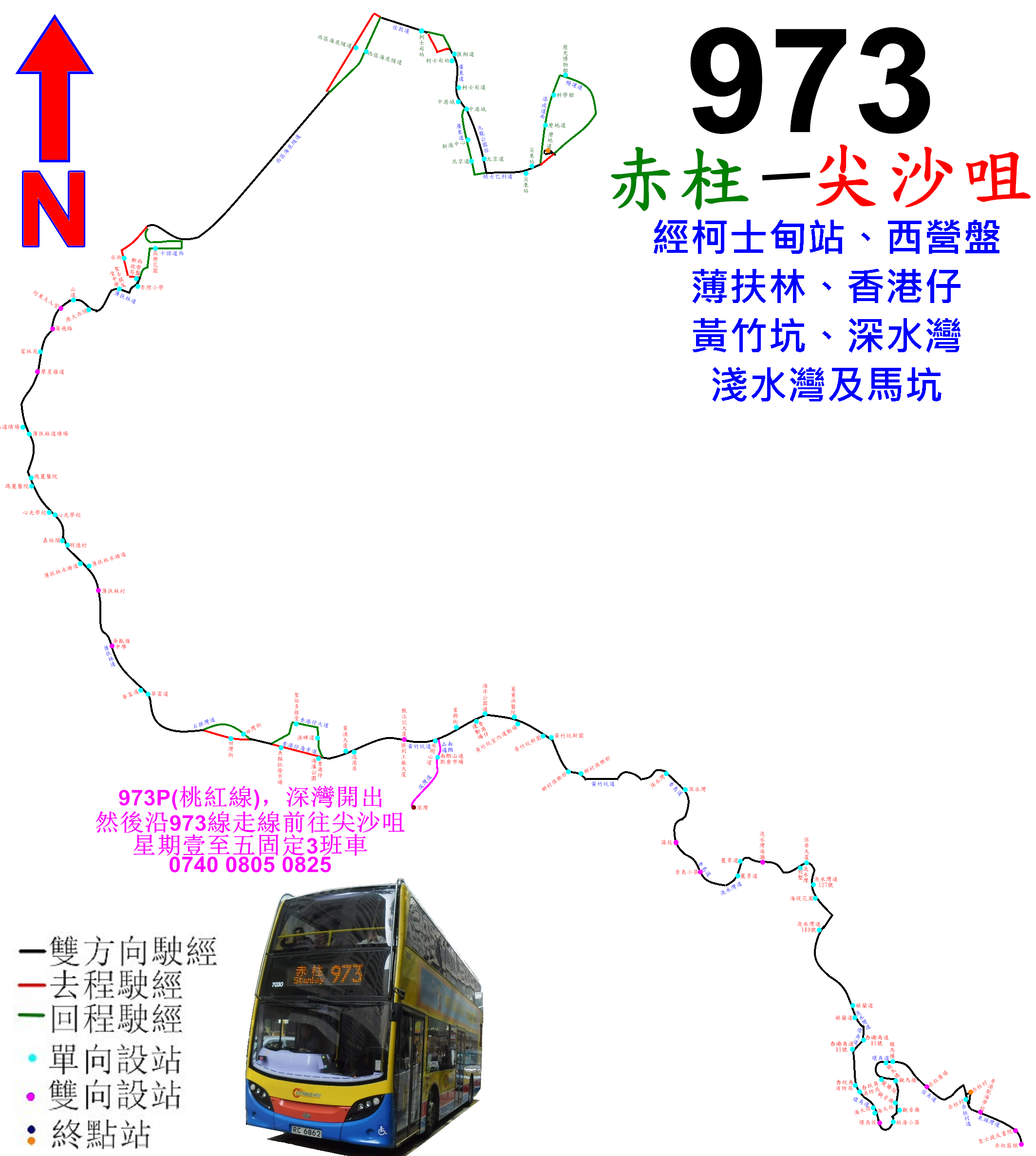 中文（香港）: 城巴973線的走線圖